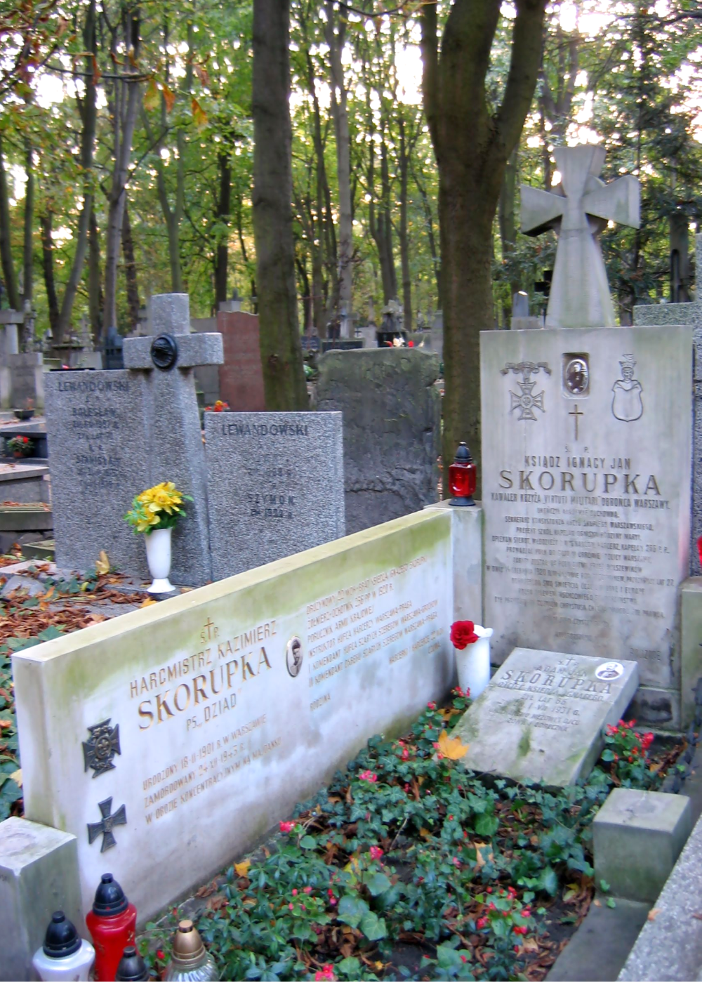 Ignacy Skorupka grave in Powązki Cemetery in Warsaw